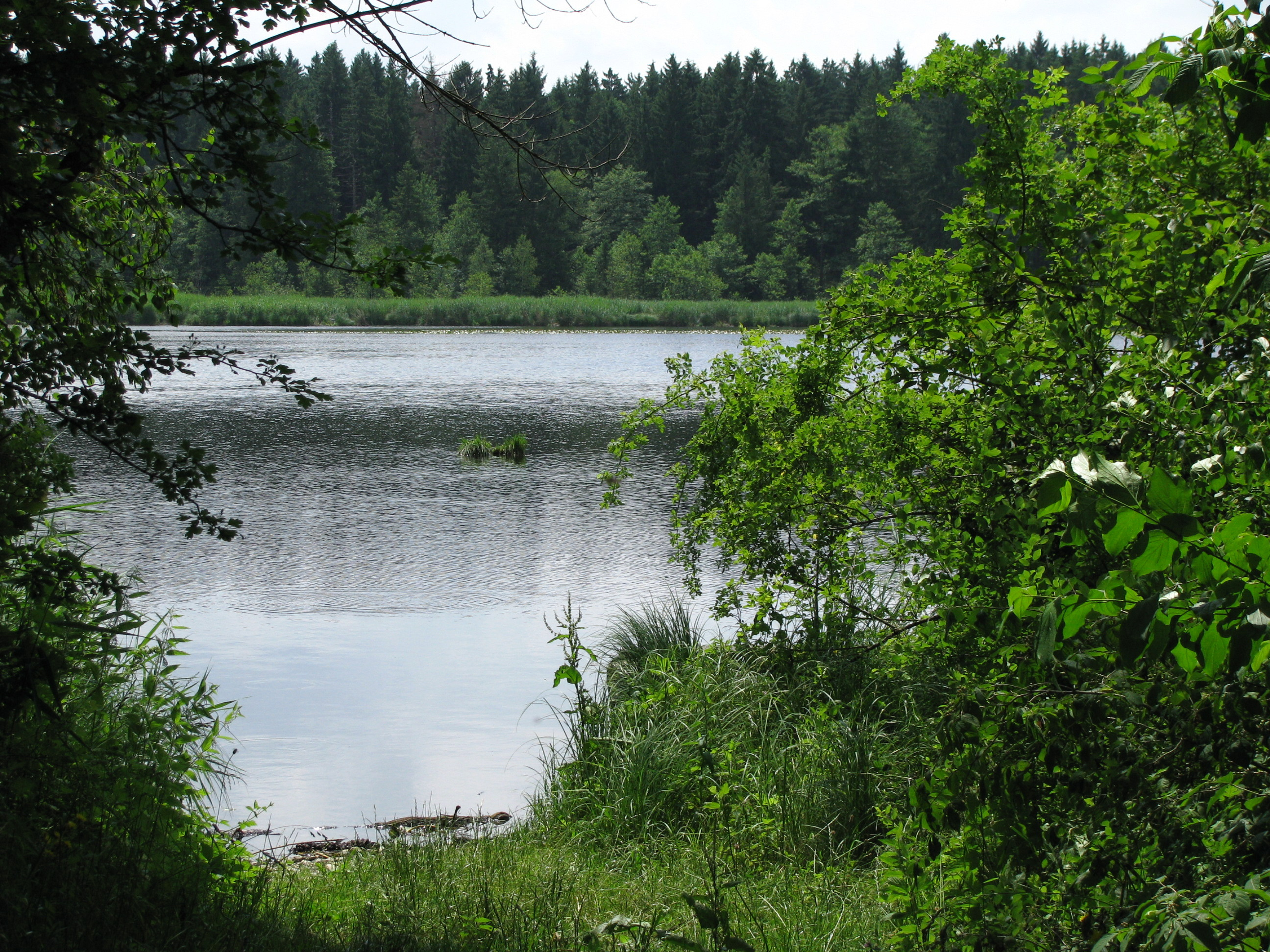 Oberhauser Weiher